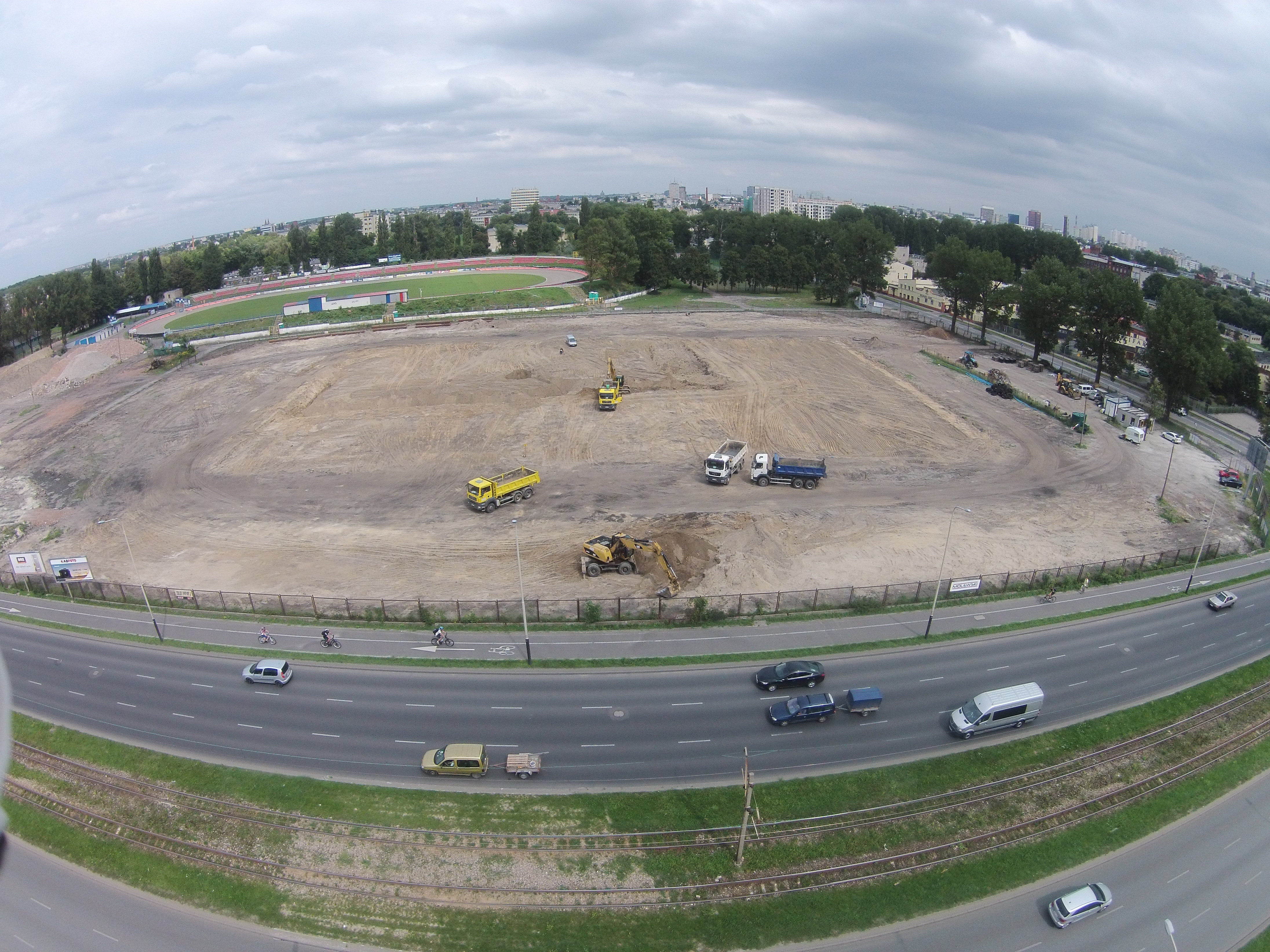 Budowa stadionu żużlowego "Orzeł" w Łodzi